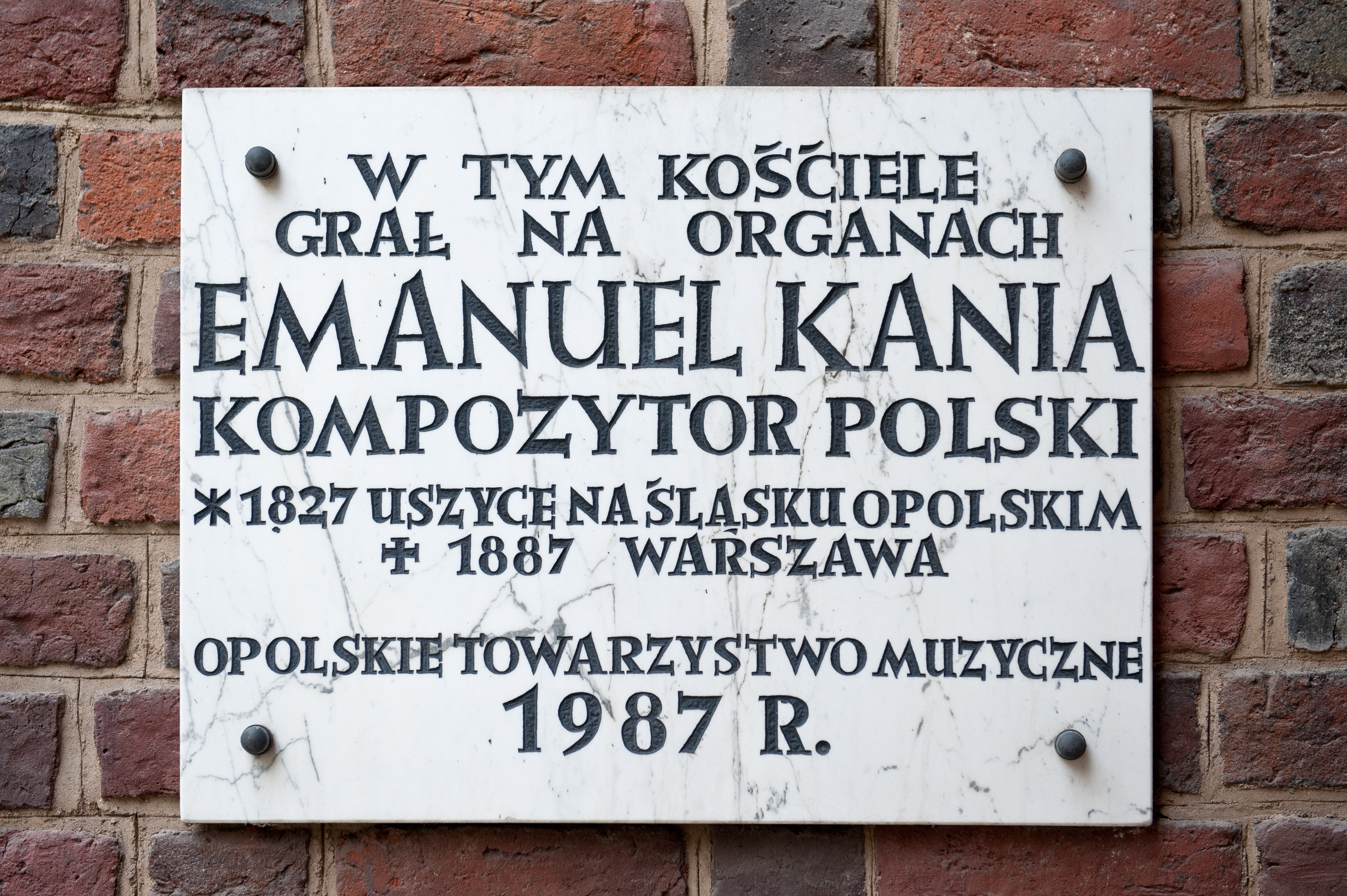 Tablica pamiątkowa poświęcona Emanuelowi Kani na ścianie kościoła św. Macieja we Wrocławiu, ul. Szewska 36a.